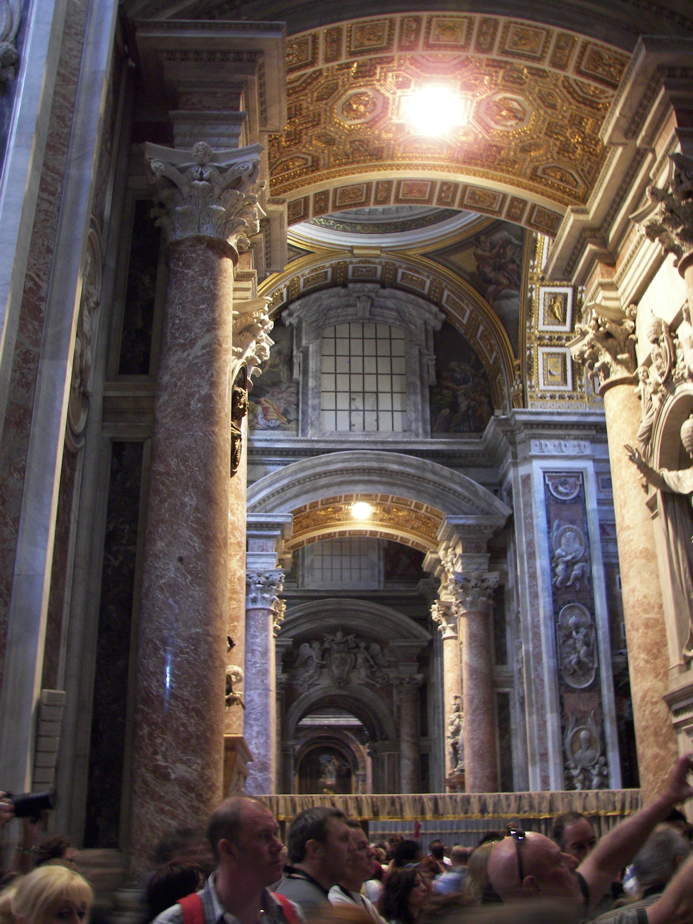 Interior of Basilica di San Pietro.